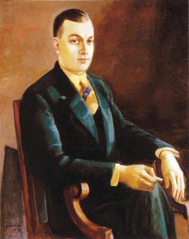 Teatterinjohtaja Arvi Kivimaa (1904–1984). Muotokuvan omistaa Suomen Kansallisteatteri.